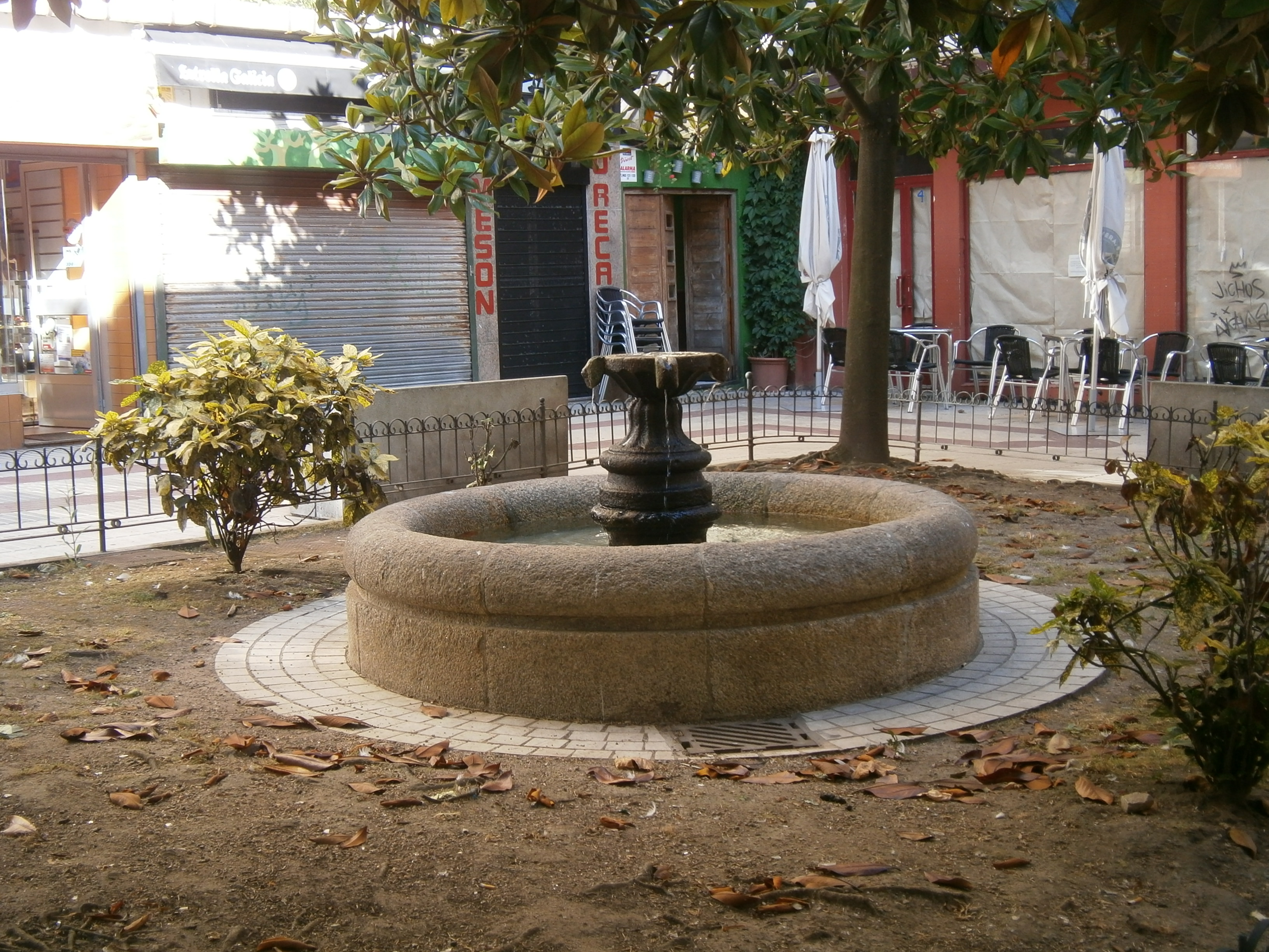 Fonte Luísa, na Coruña